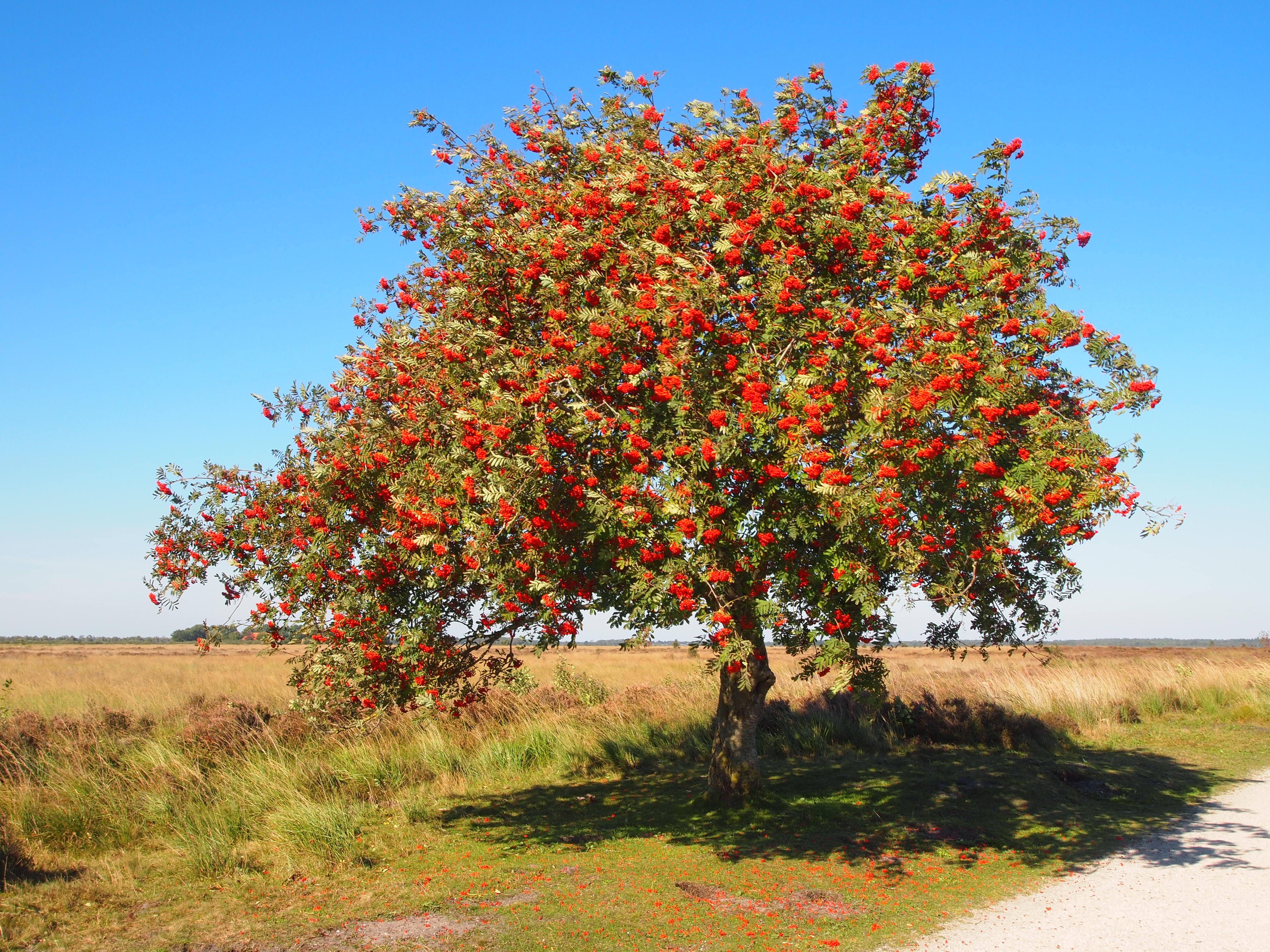 Lijsterbes op het Fochteloërveen